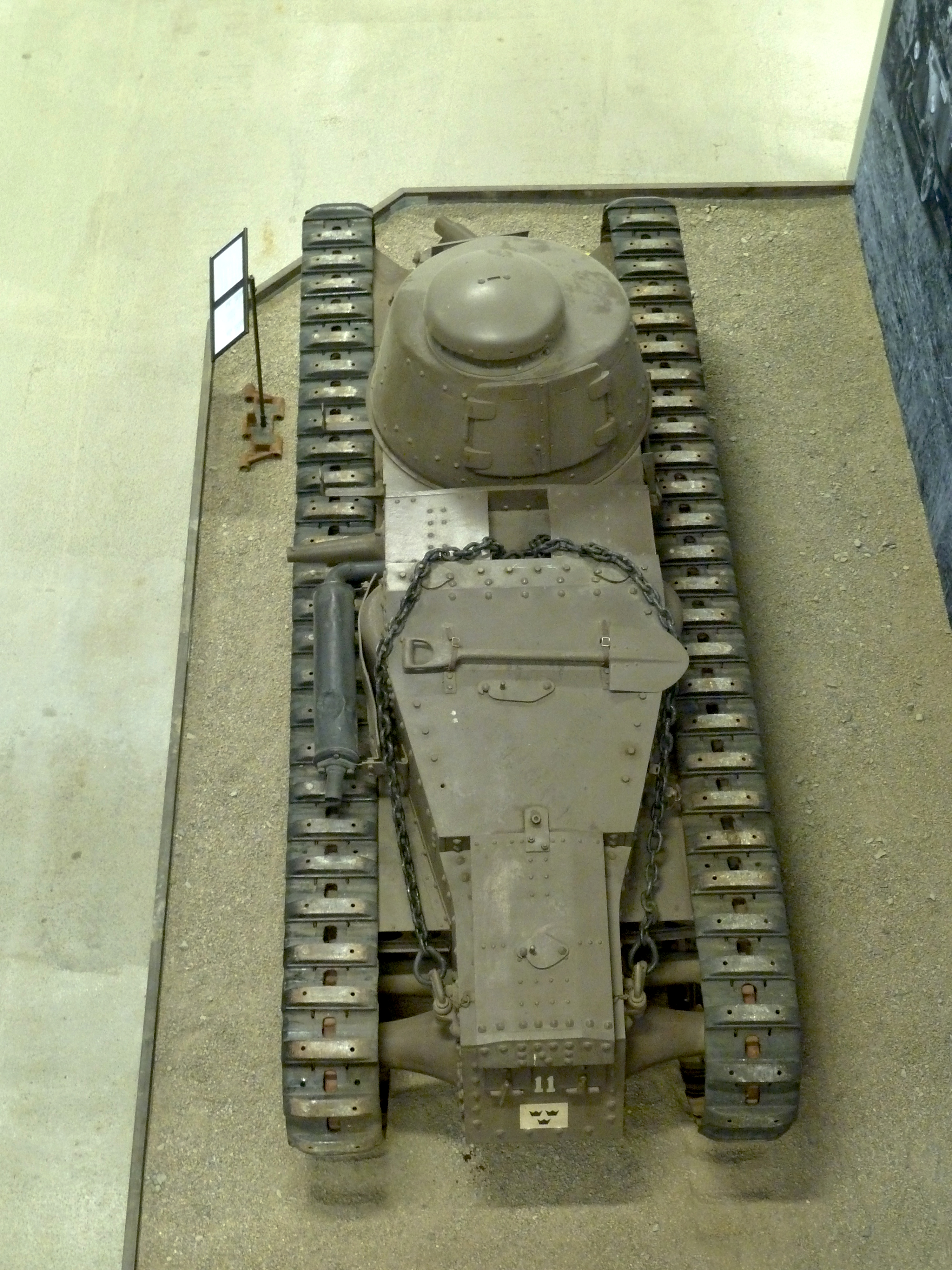 Leichter Panzer Renault NC 27 im Sveriges Försvarsfordonsmuseum - Arsenalen - in Strängnäs am 12.August 2011